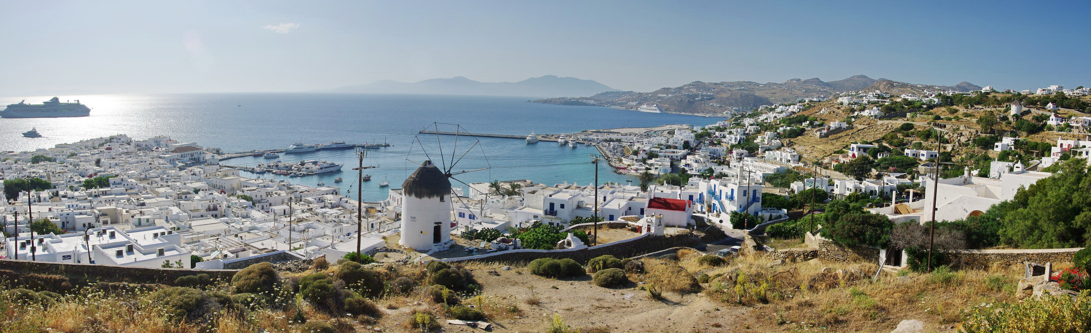 Panorama Mykonos